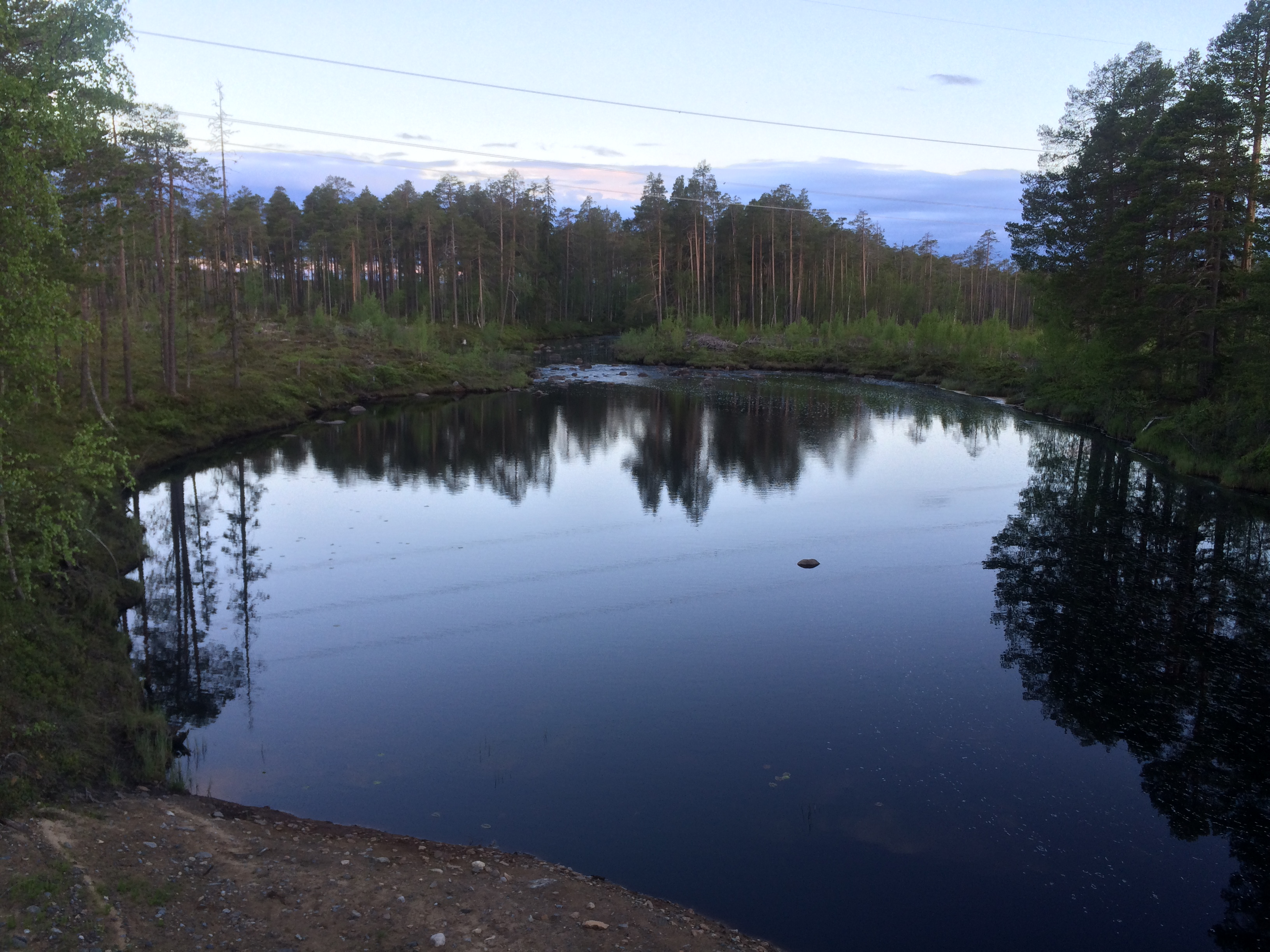 река Летняя (Кемский район)